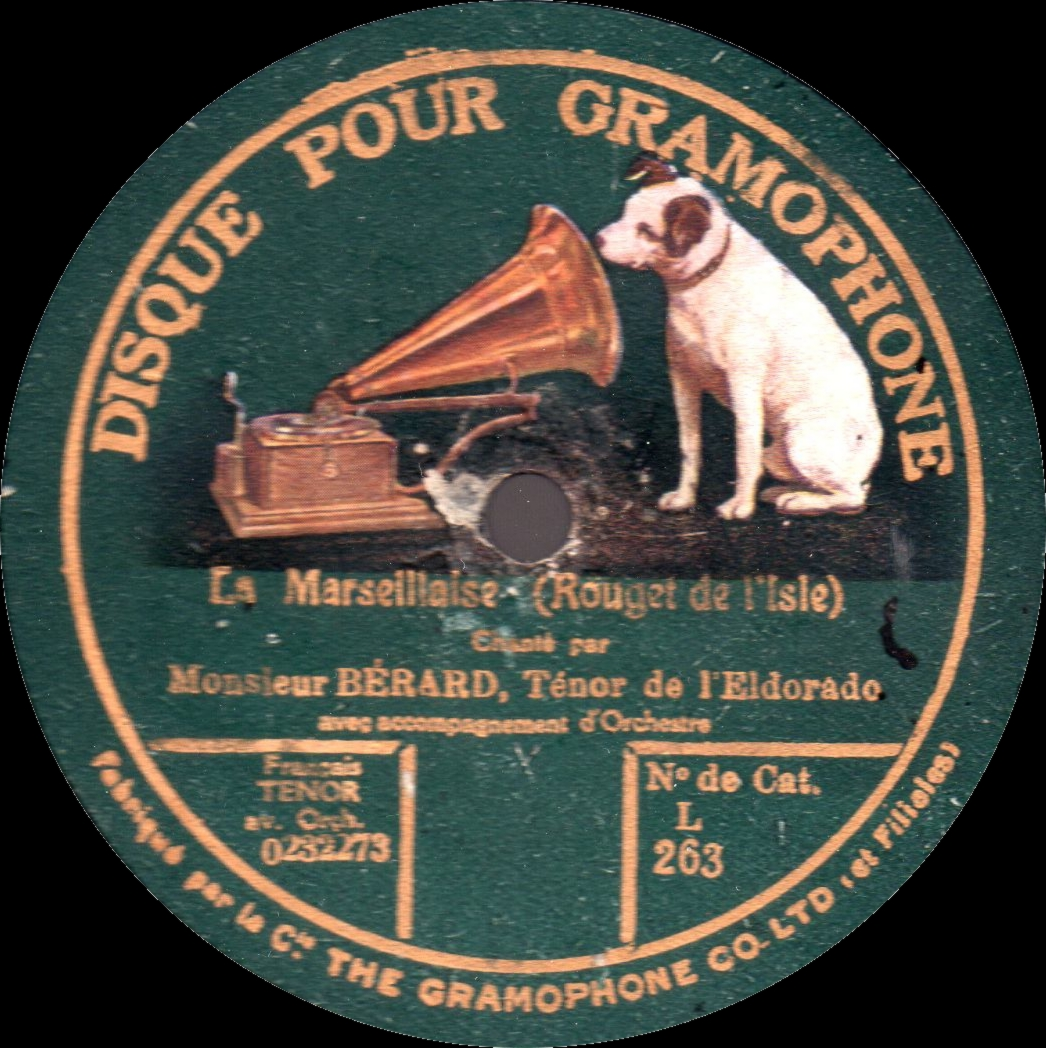 Bérard. Disque Pour Gramphone. 1919